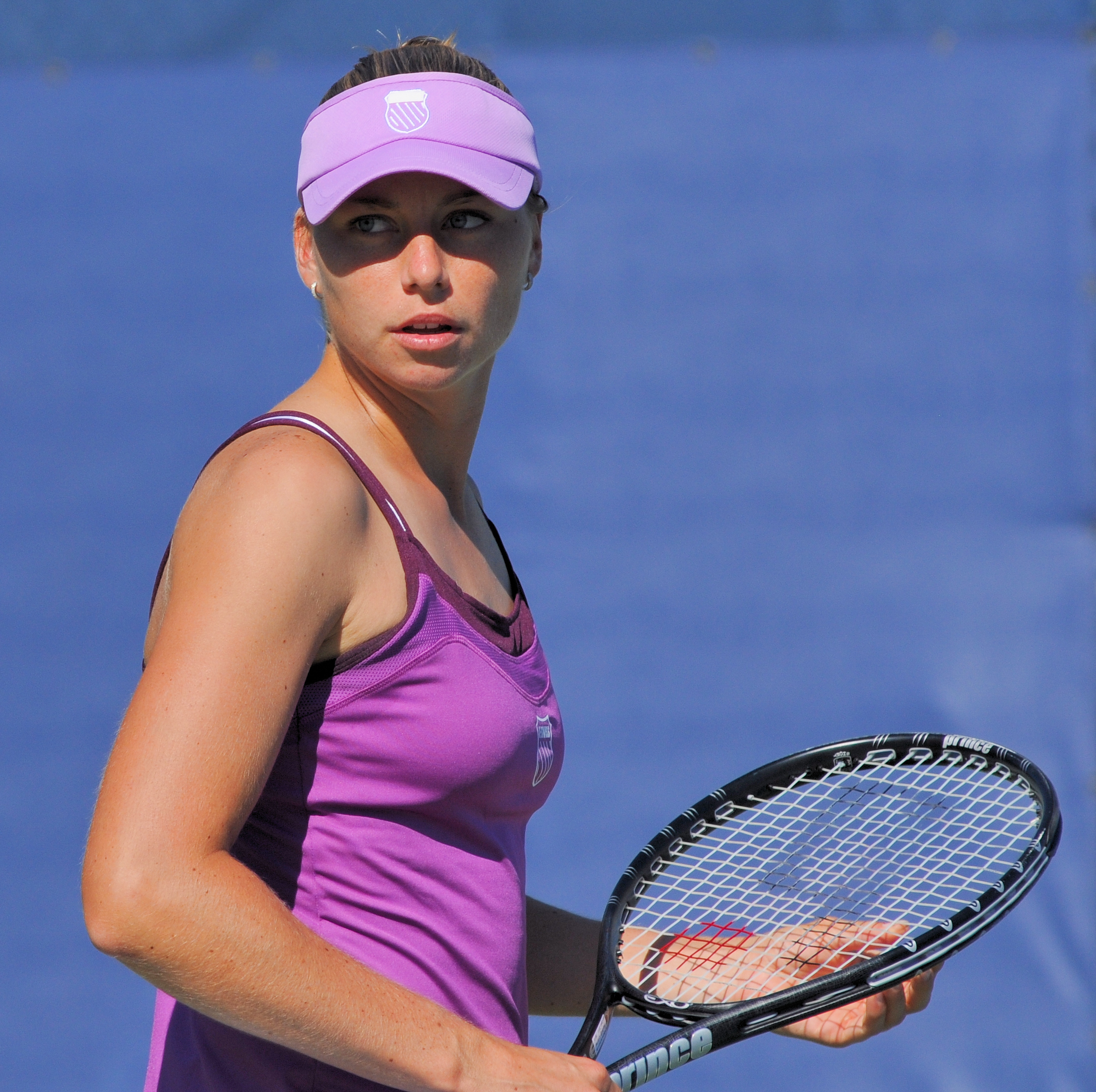 Vera Zvonareva - US Open 2010